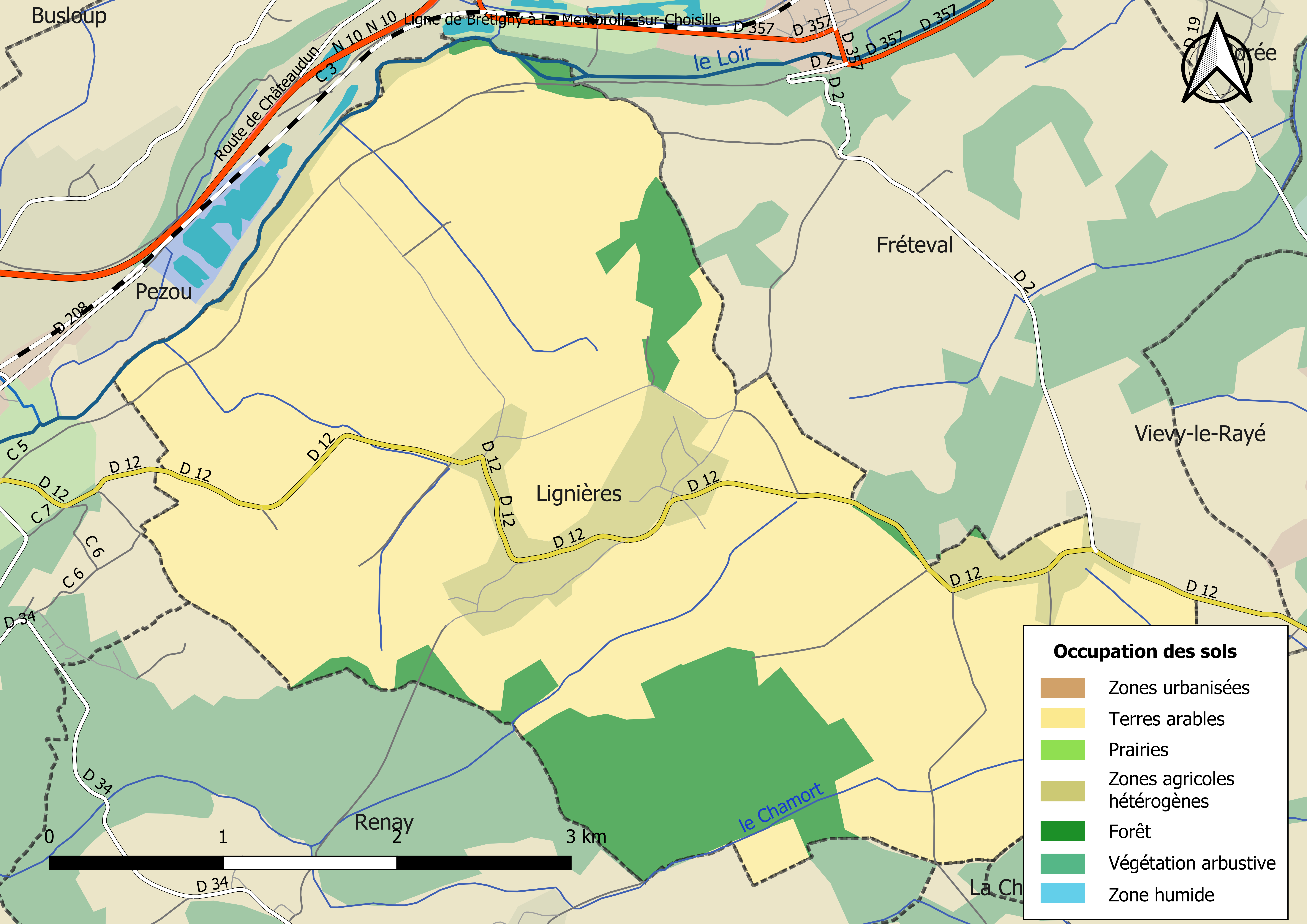 Carte des infrastructures et de l’occupation des sols en 2018 de la commune de Lignières (Loir-et-Cher (France).